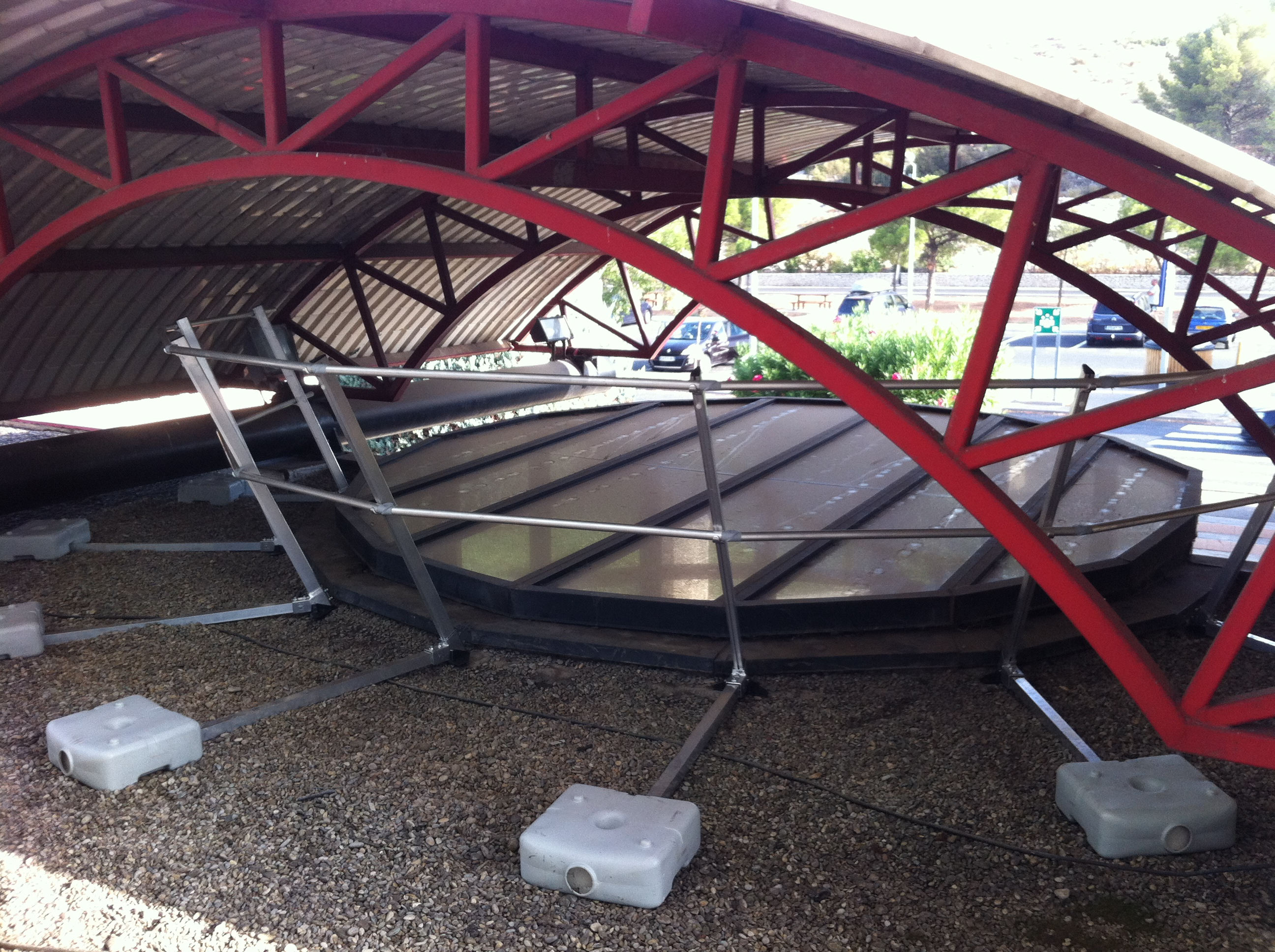 Garde-corps Ecostable Autoportant de chez AJUVA Safety